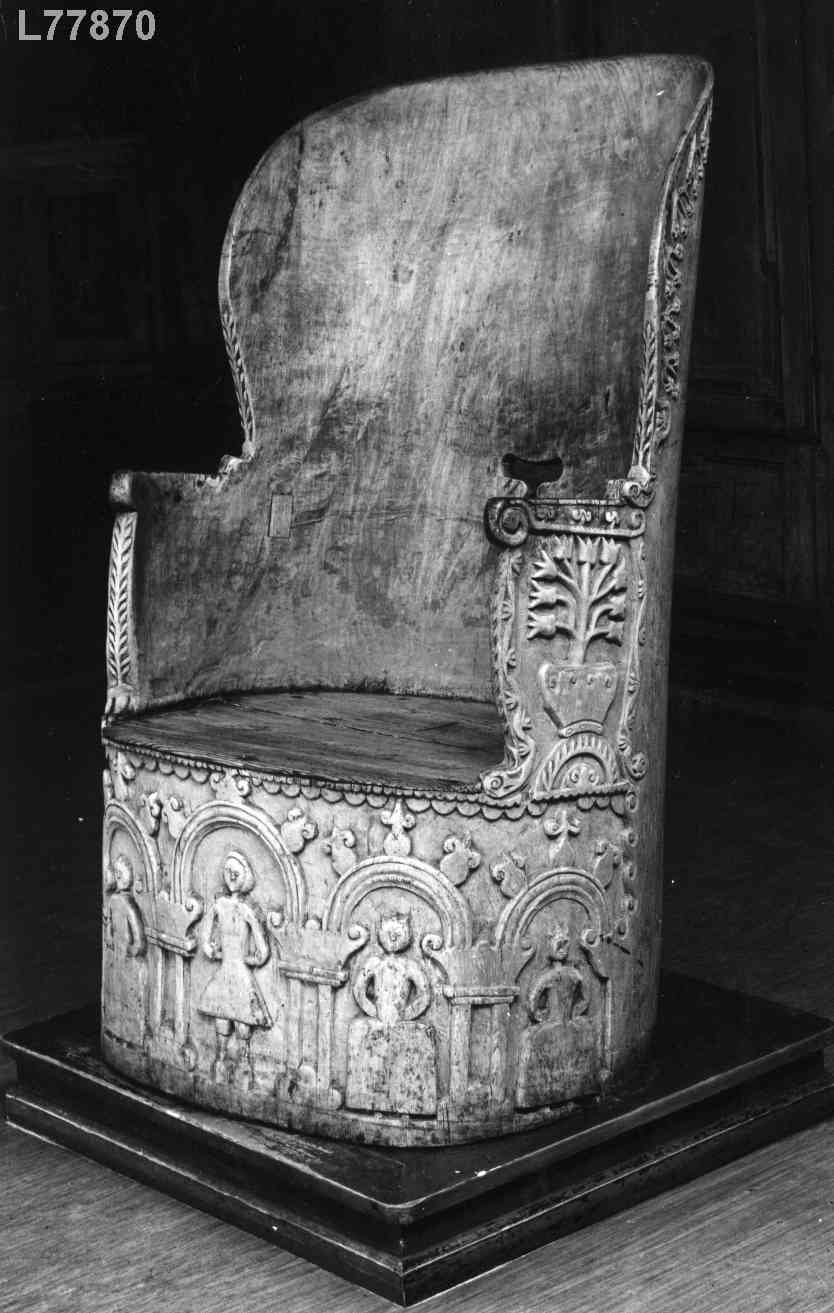 Kubbestol fra Stokke kirke i Vestfold. Nå på Norsk Folkemuseum. NF.1907-0062